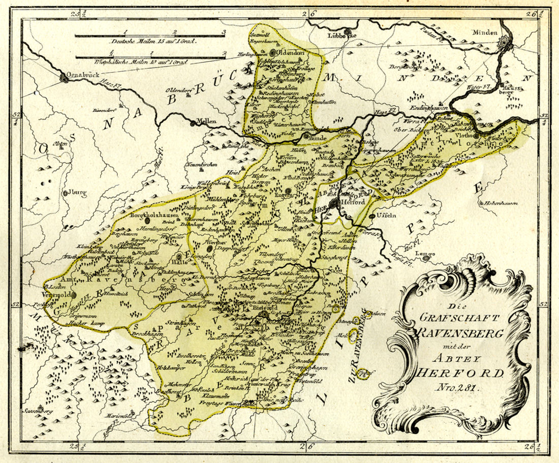 Karte der Grafschaft Ravensberg mit der Abtey Herford - Die Grafschaft wurde zwischen Brandenburg und Pfalz-Neuburg wiederholt verwaltungsmäßig geteilt, erst 1647 fiel sie an die Hohenzollern